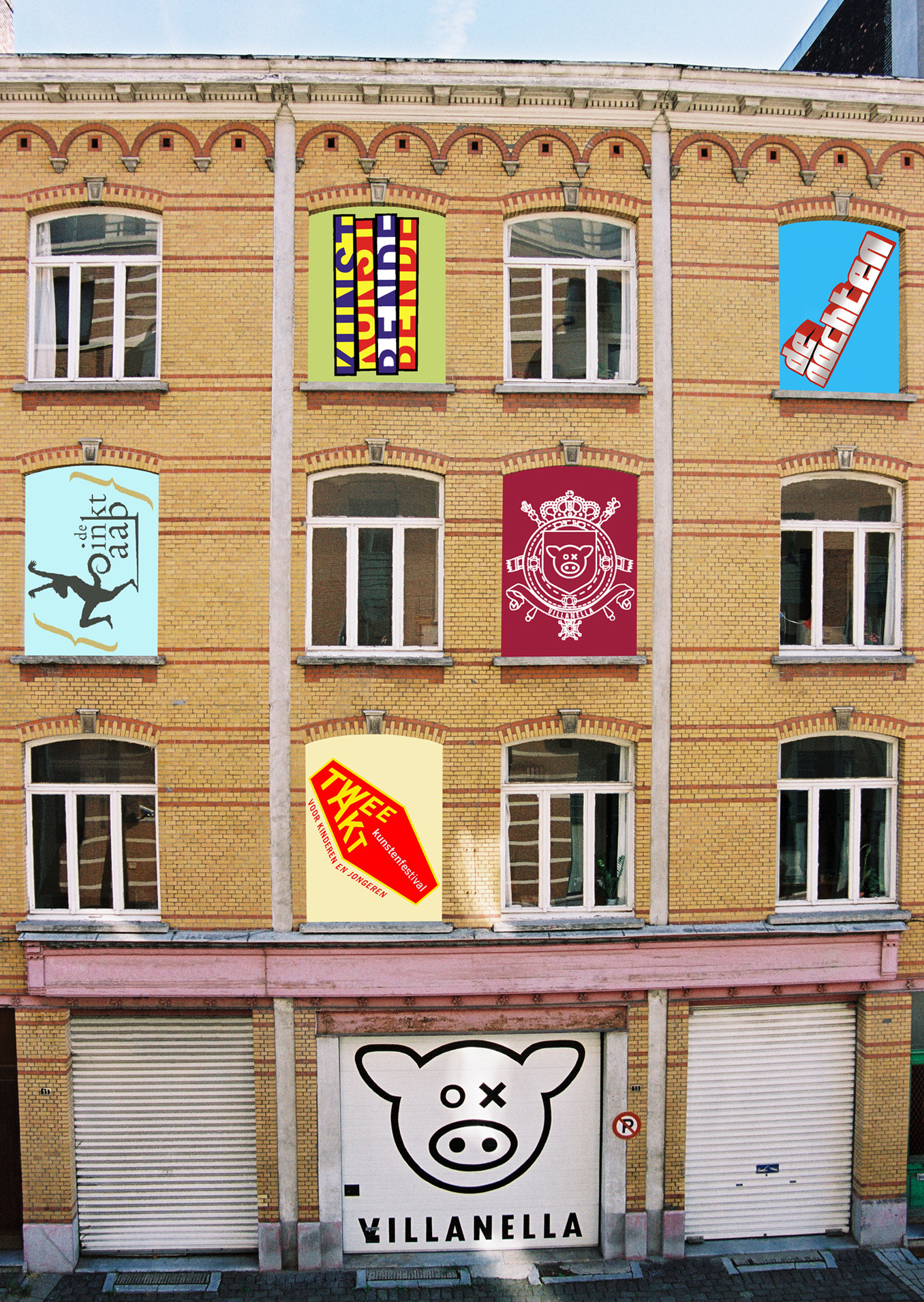 Gevel van het voormalige gebouw van Villanella in een voormalig pakhuis, Verviersstraat 11-15, Antwerpen